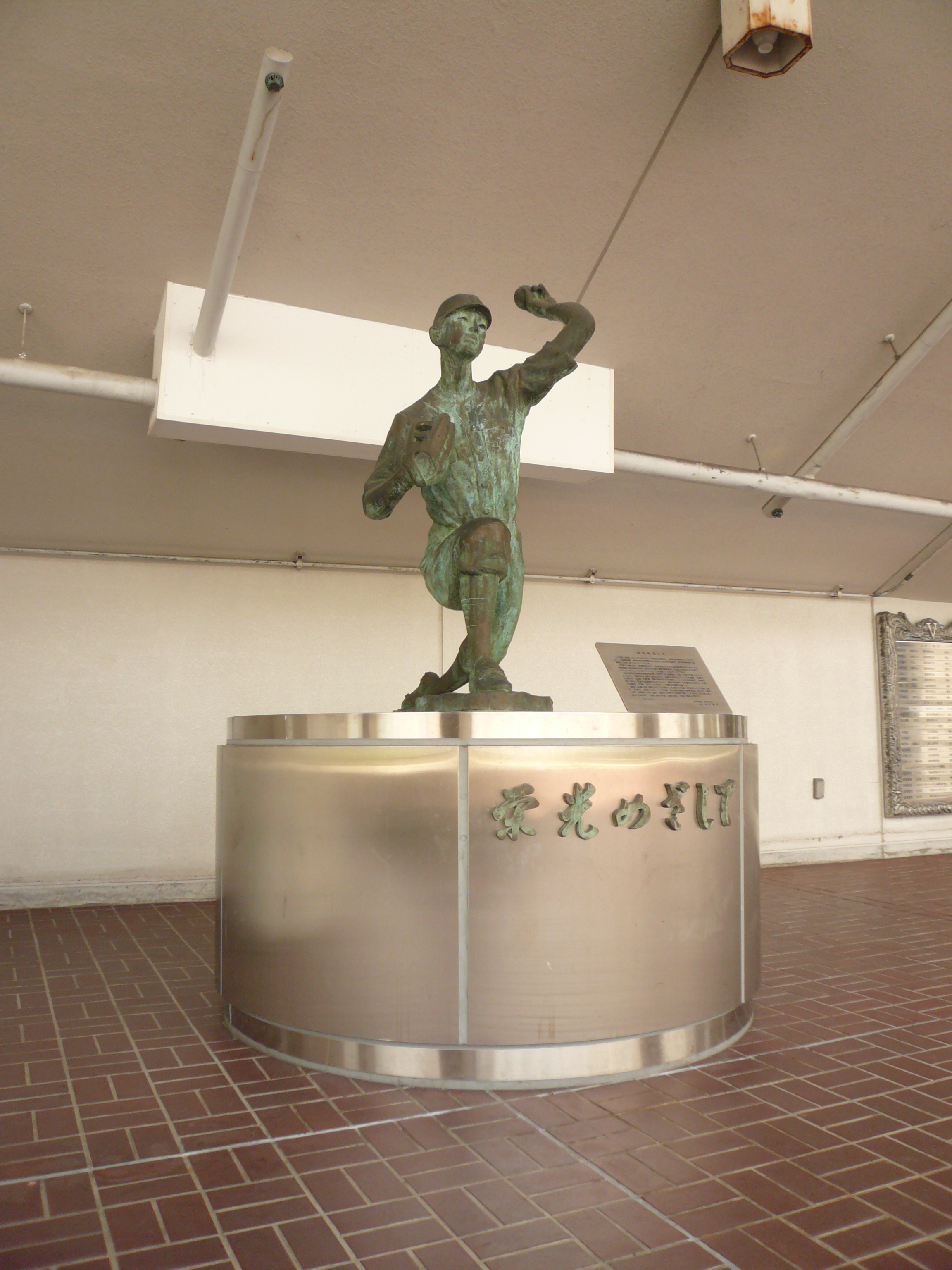 Nagaragawa Baseball Stadium Eizo Matsui bronze statue（長良川球場）,Gifu,Gifu(岐阜県岐阜市)で撮影。松井栄造像「栄光めざして」